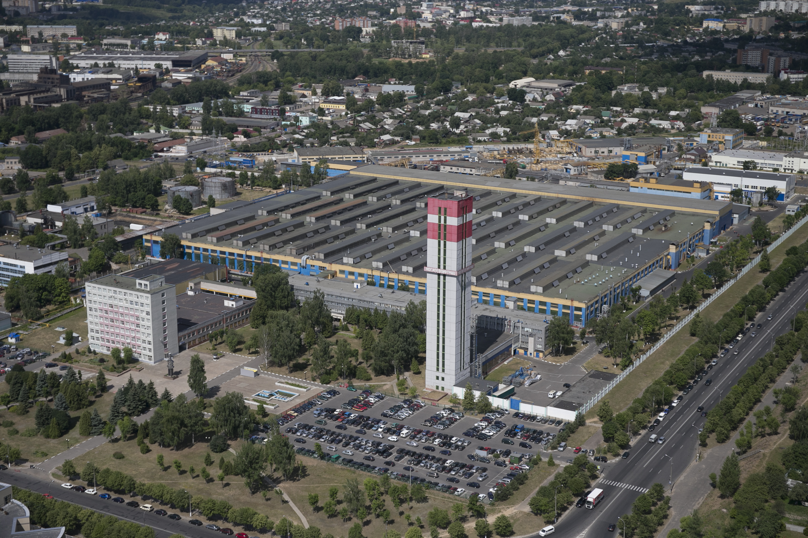 Панорама ОАО Могилевлифтмаш Панарама ААТ Магілёўліфтмаш